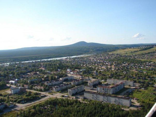 Красновишерск с вертолета